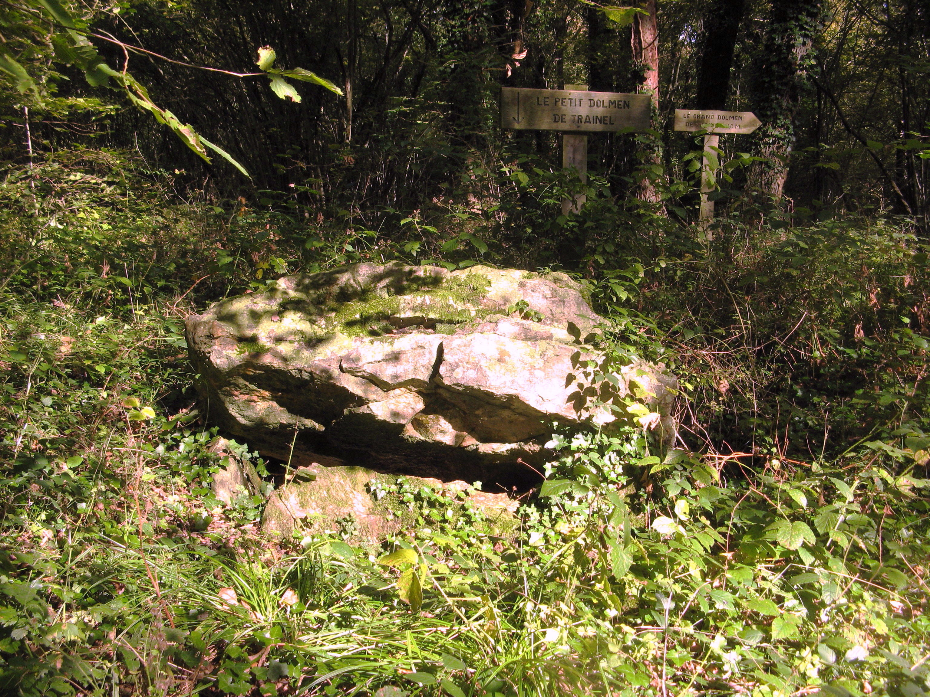 Saint-Maurice-aux-Riches-Hommes : petit dolmen de Treinel